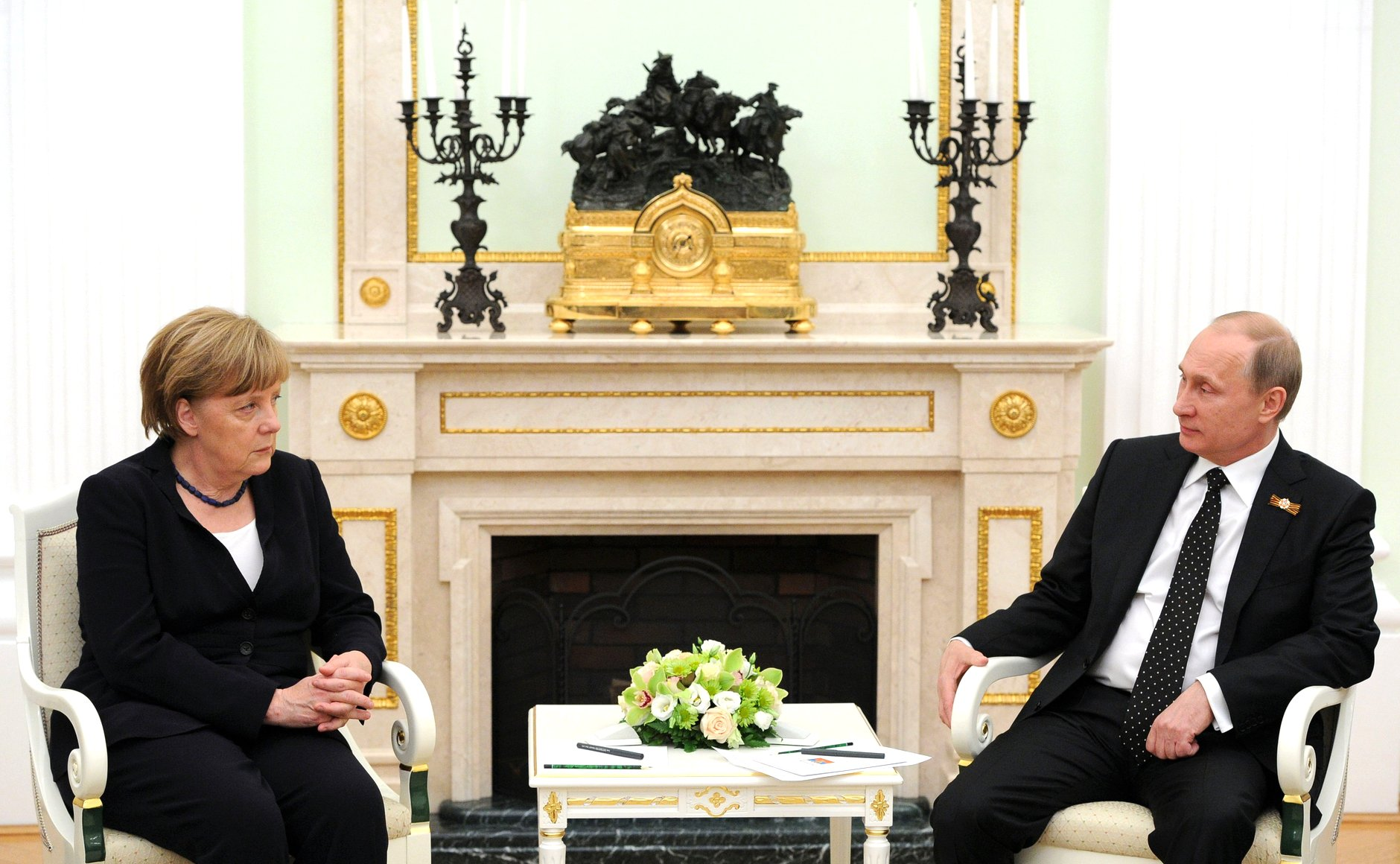 Встреча Президента России Владимира Путина с Канцлером Германии Ангелой Меркель